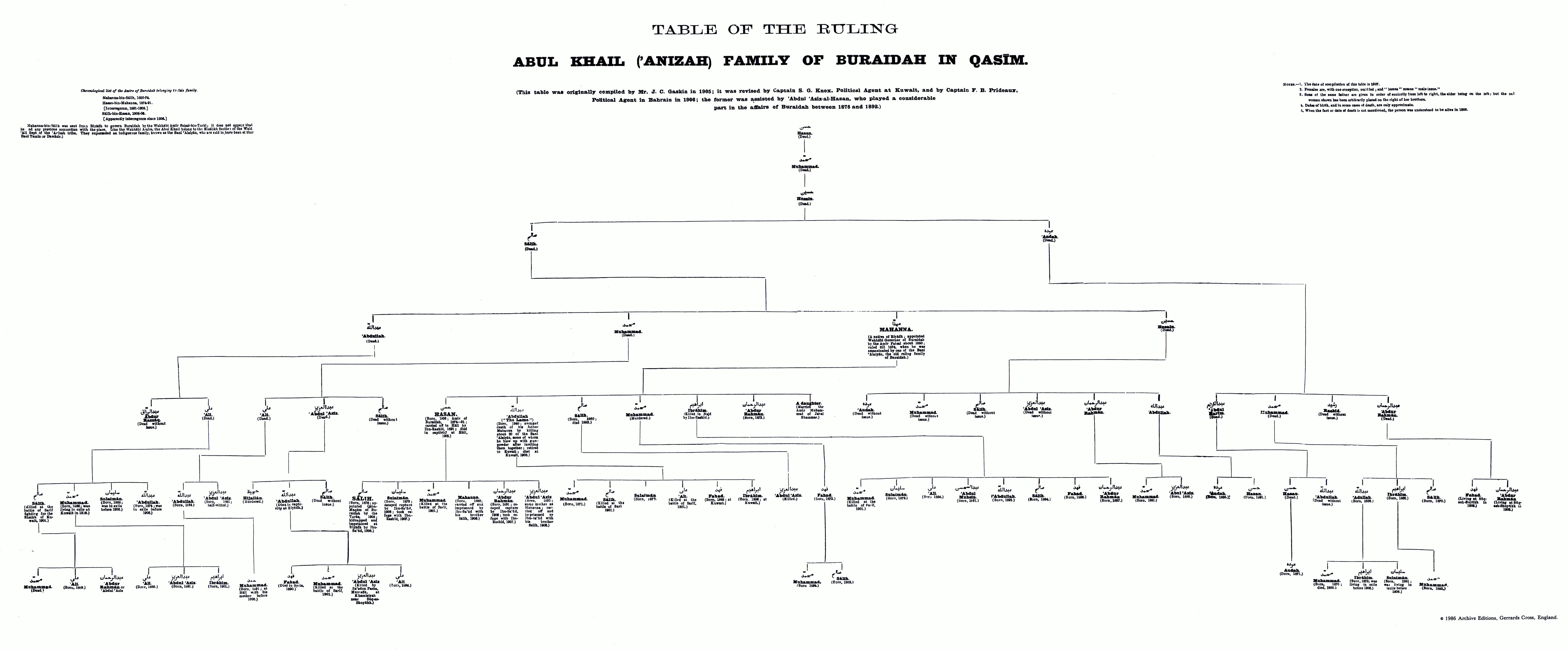 شجرة نسب أسرة ابا الخيل الحاكمة في بريدة من كتاب دليل الخليج للمؤلف لوريمر عام 1905